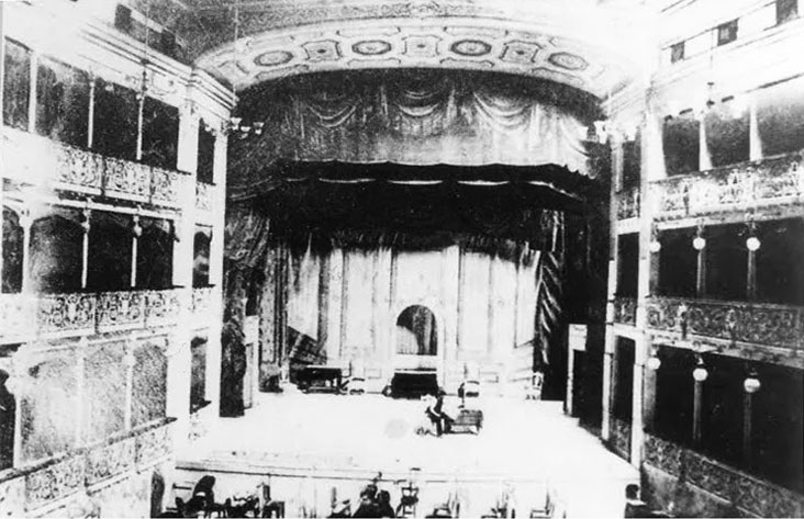 1895 ca Teatro Verdi prima dell'incendio